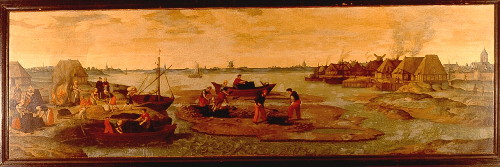 Painting of darink delven in Stadhuismuseum van Zierikzee